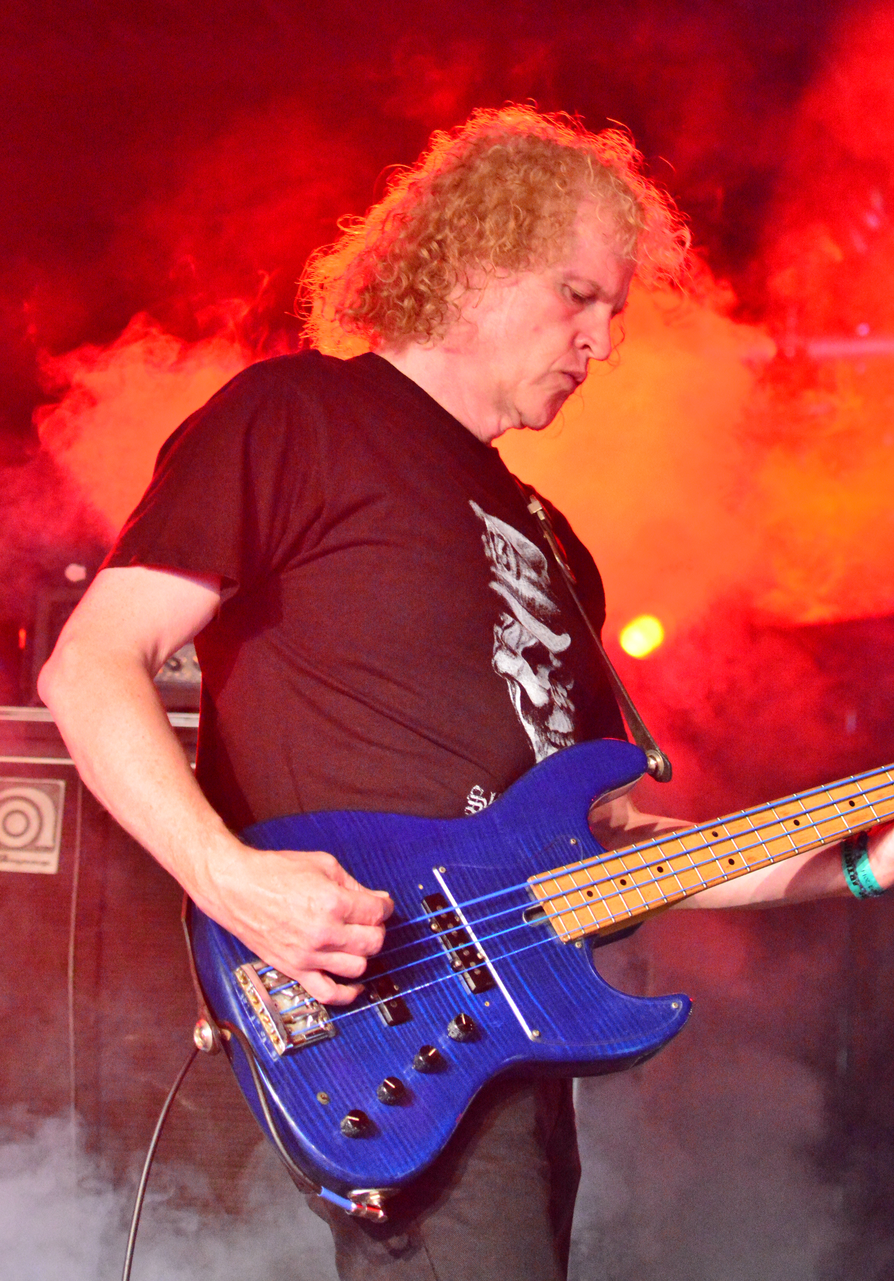 Eddie Moohan von Diamond Head beim Headbangers Open Air 2014